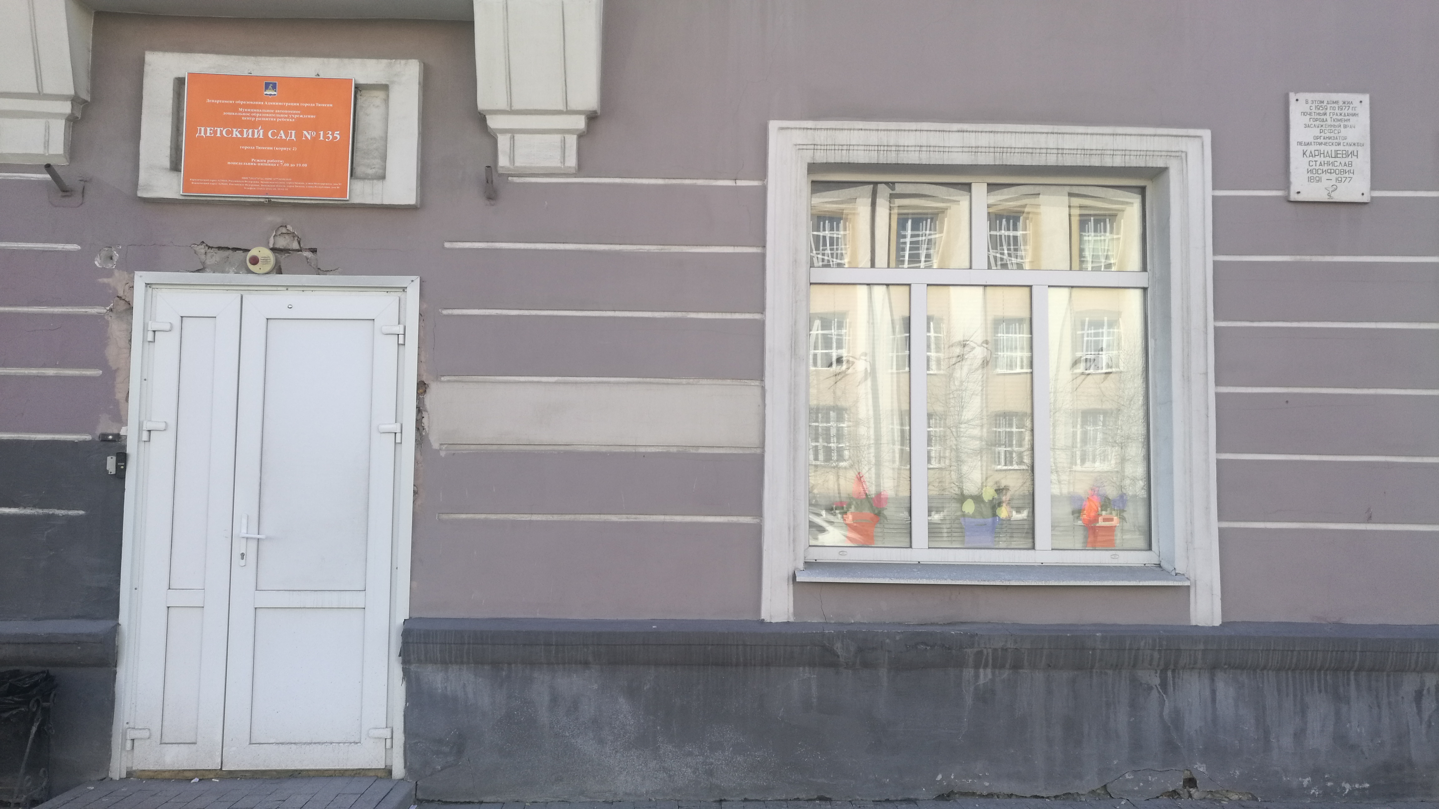 Infanĝardeno N 135. Tjumeno, Rusio.